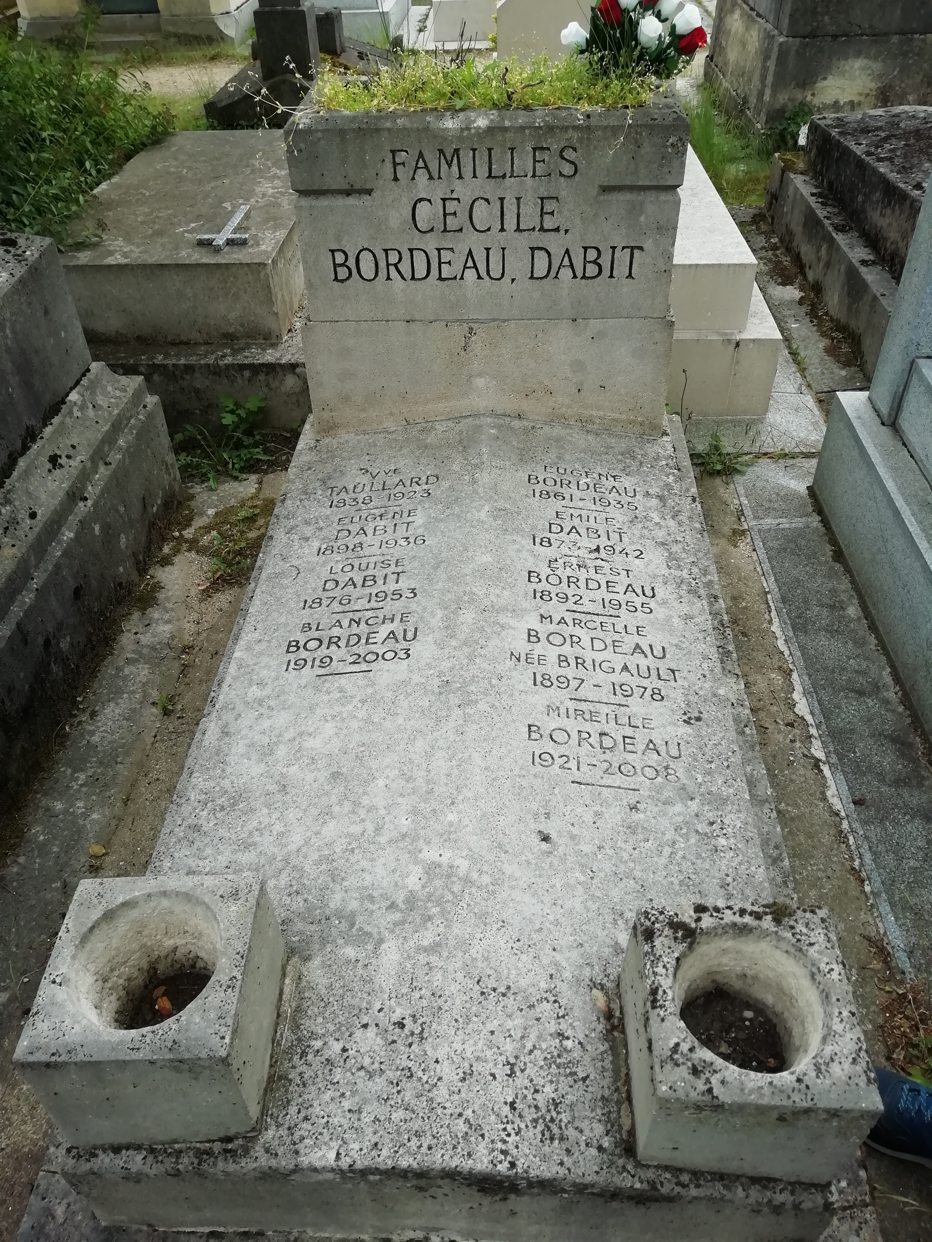 Tombe de Mireille Bordeau au cimetière du Père-Lachaise.